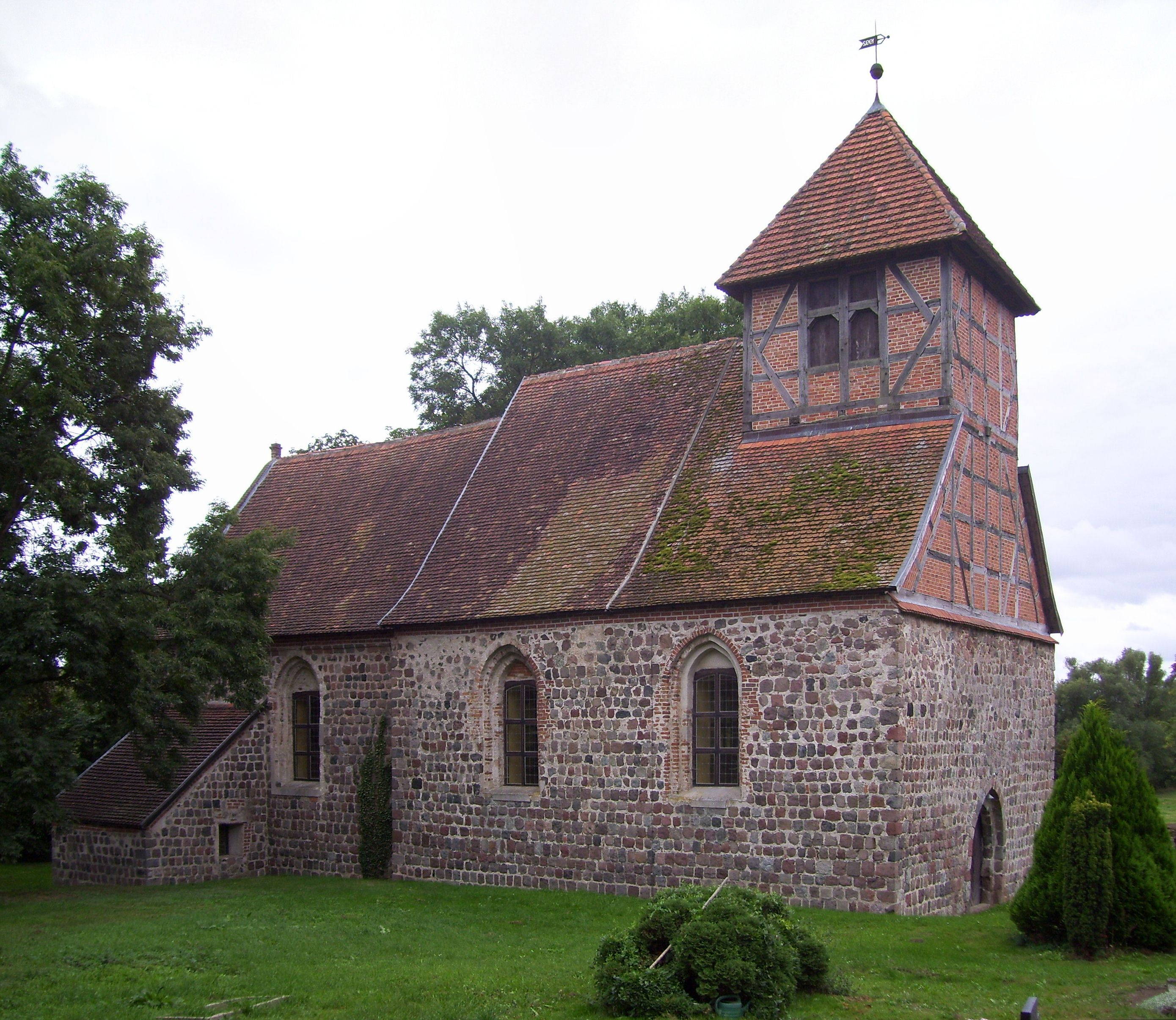 Kirche in Brohm, Friedland (Mecklenburg), Ansicht von Nordwesten